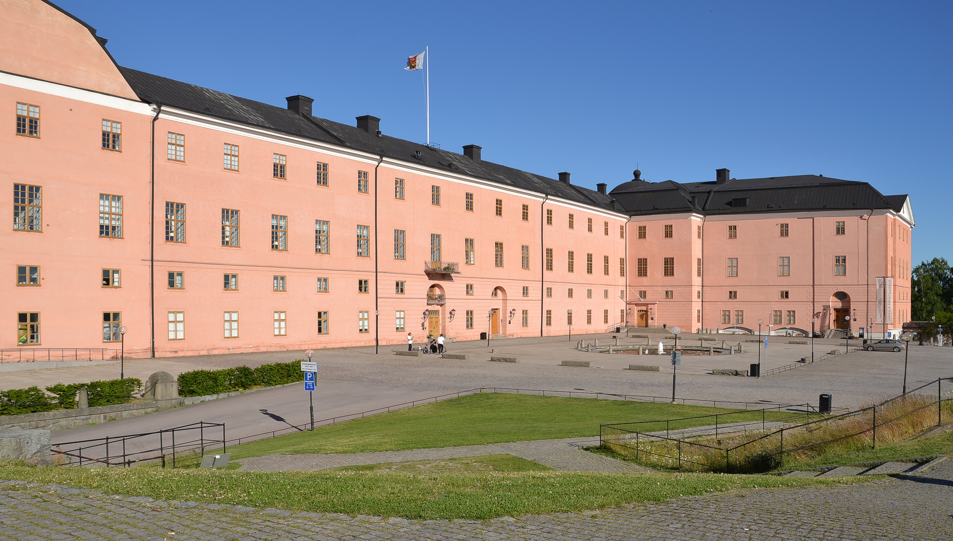 Uppsala slott (Fjärdingen 33:1)